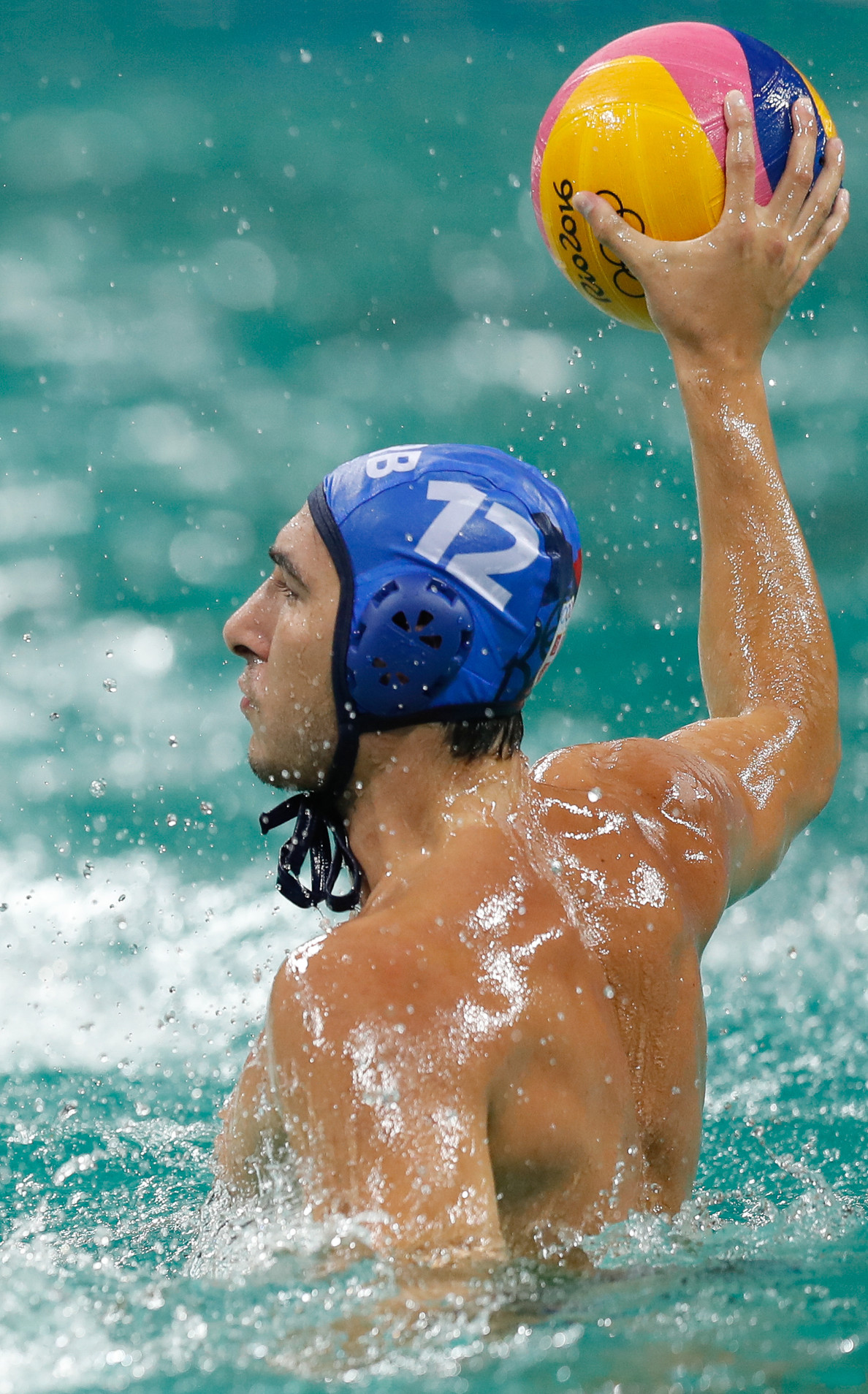 Seleção masculina brasileira de polo aquático vence a da Sérvia por 6 a 5 nos Jogos Olímpicos Rio 2016 no Parque Aquático Maria Lenk (Fernando Frazão/Agência Brasil)